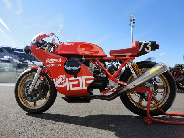 Magni-Experience